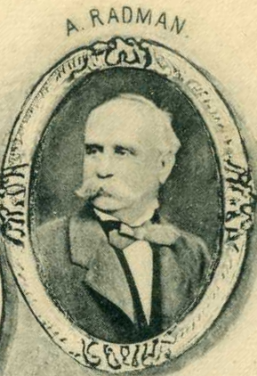 Antonio Radman. Fonte: scansione da cartolina del 1903 nella mia collezione personale.